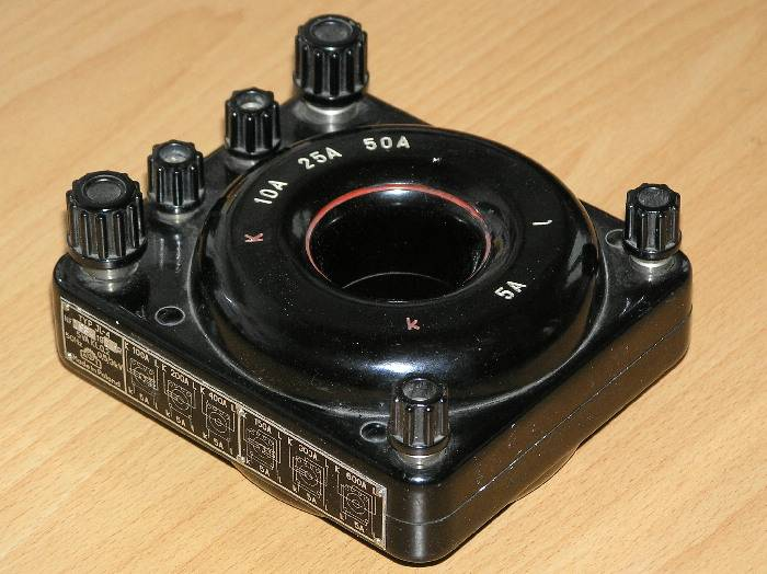 Przekładnik prądowy laboratoryjny produkcji polskiej. Typ: JL-4 Moc: 5VA Klasa: 0,2 Zakres przekładni od 10/5A do 600/5A